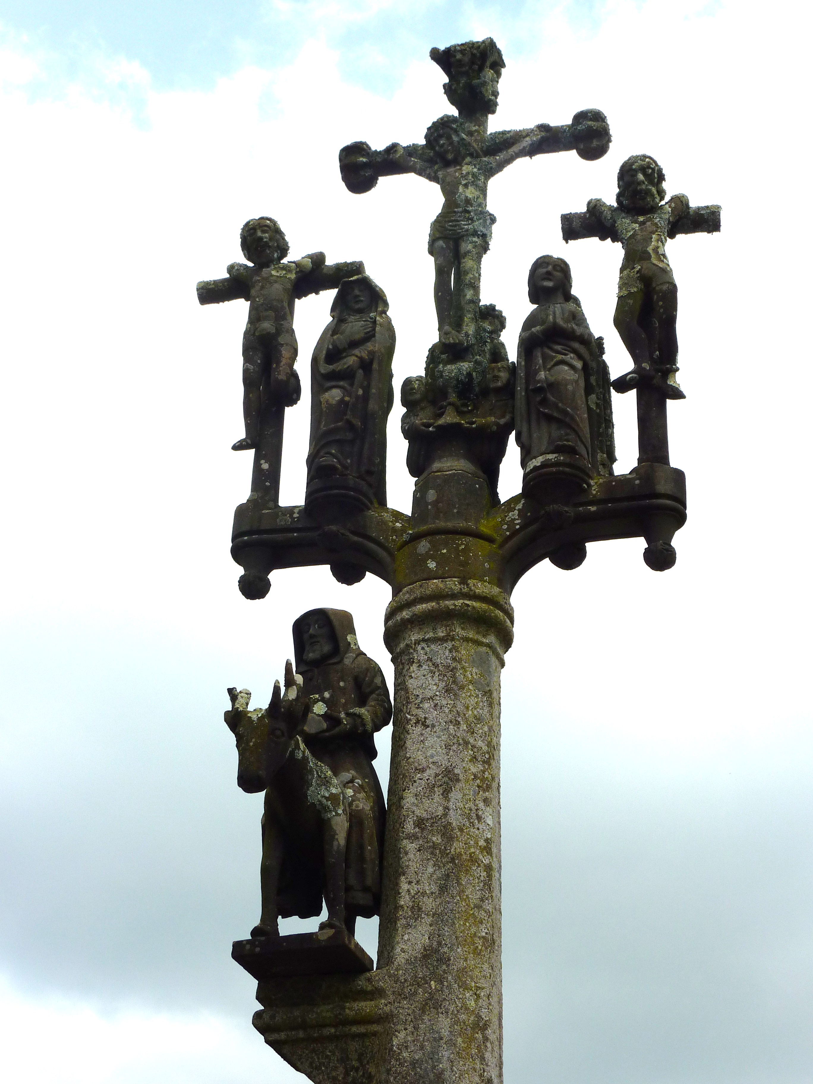 Lannédern: le calvaire